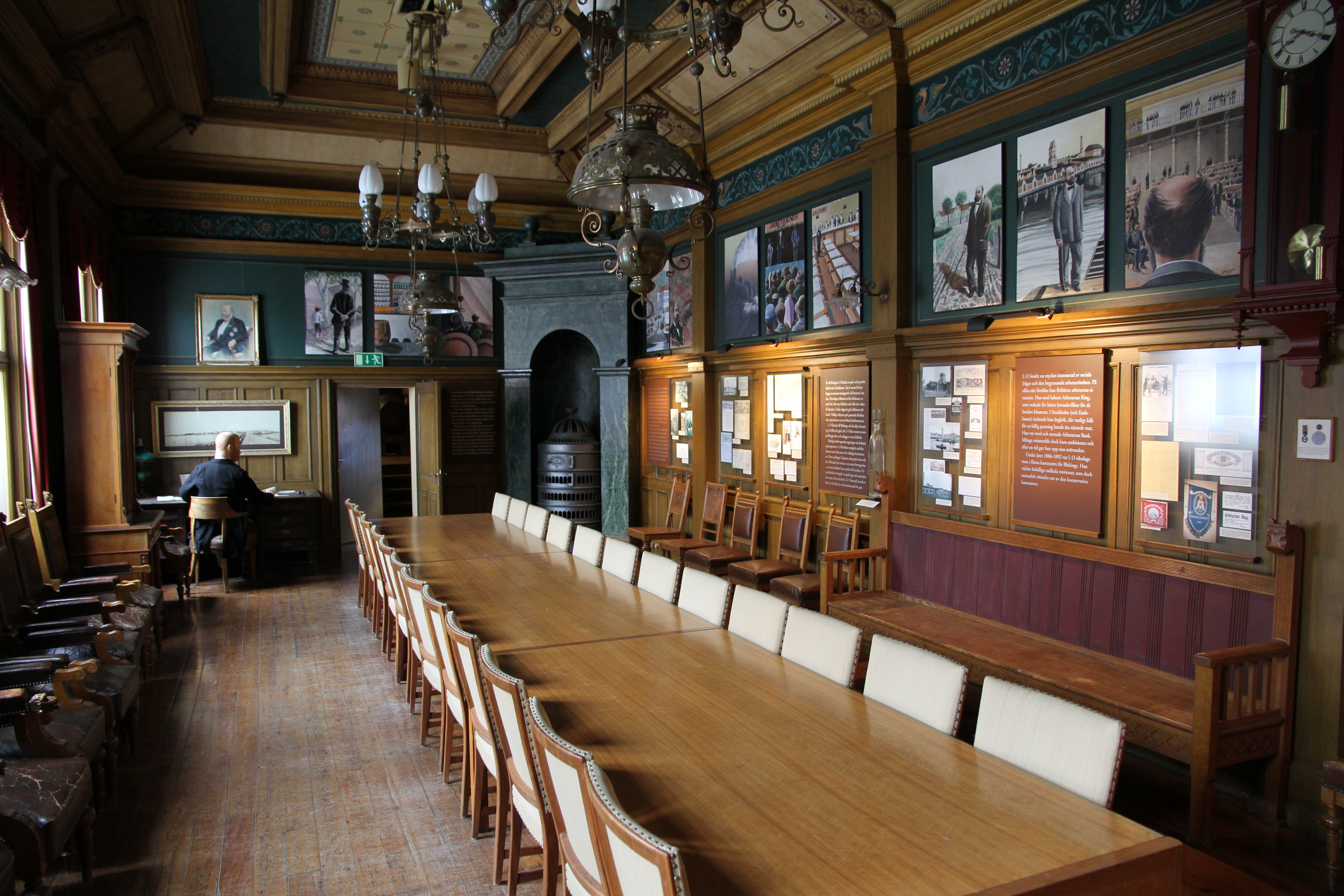 Spritbolagssalen på Karlshamns museum